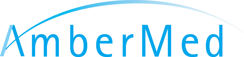 zu sehen ist das Logo von Amber Med